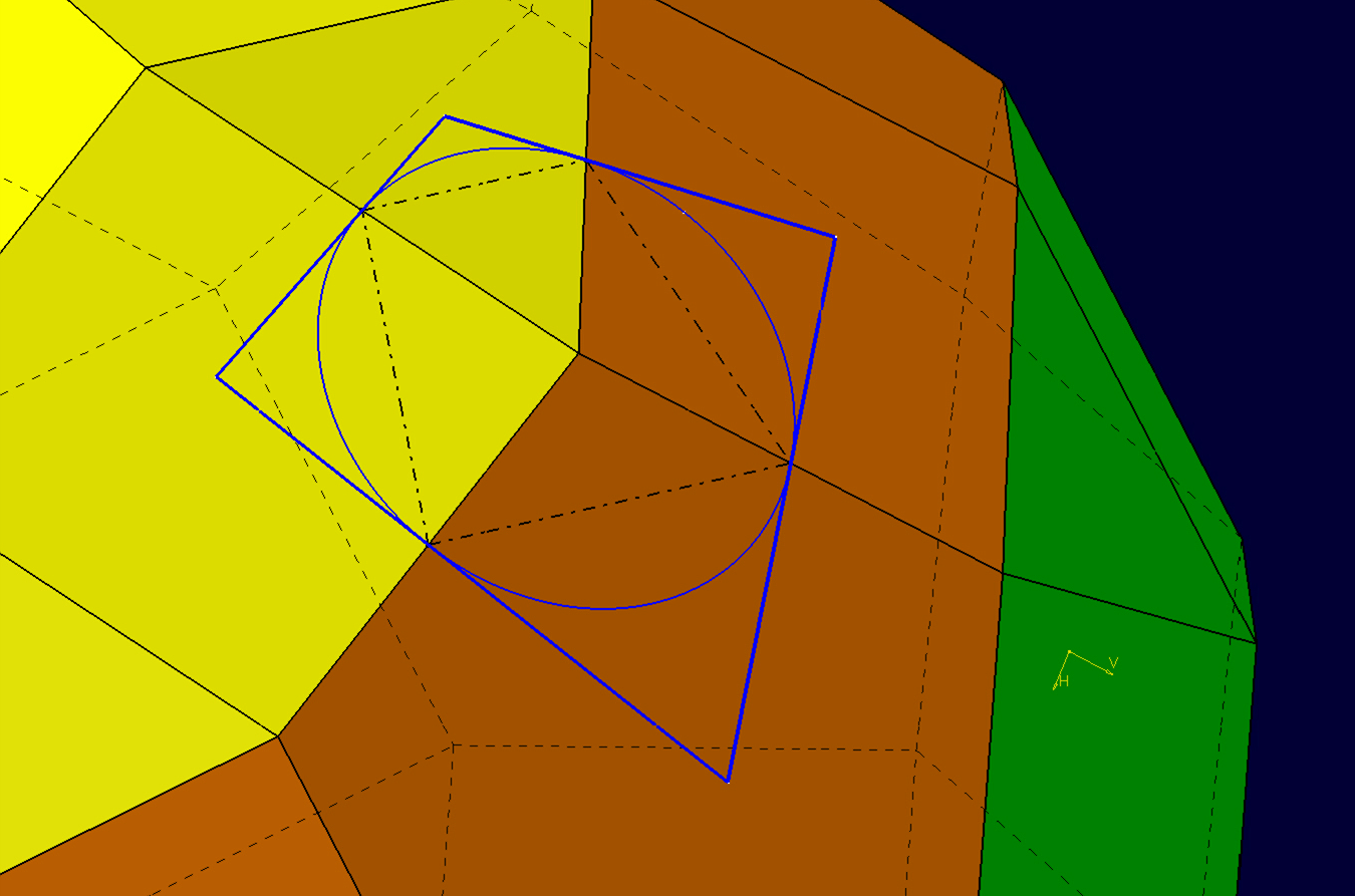 Konstruktion des Drachenvierecks für das Deltoidalhexakontaeder am dualen Rhombenikosidodekaeder